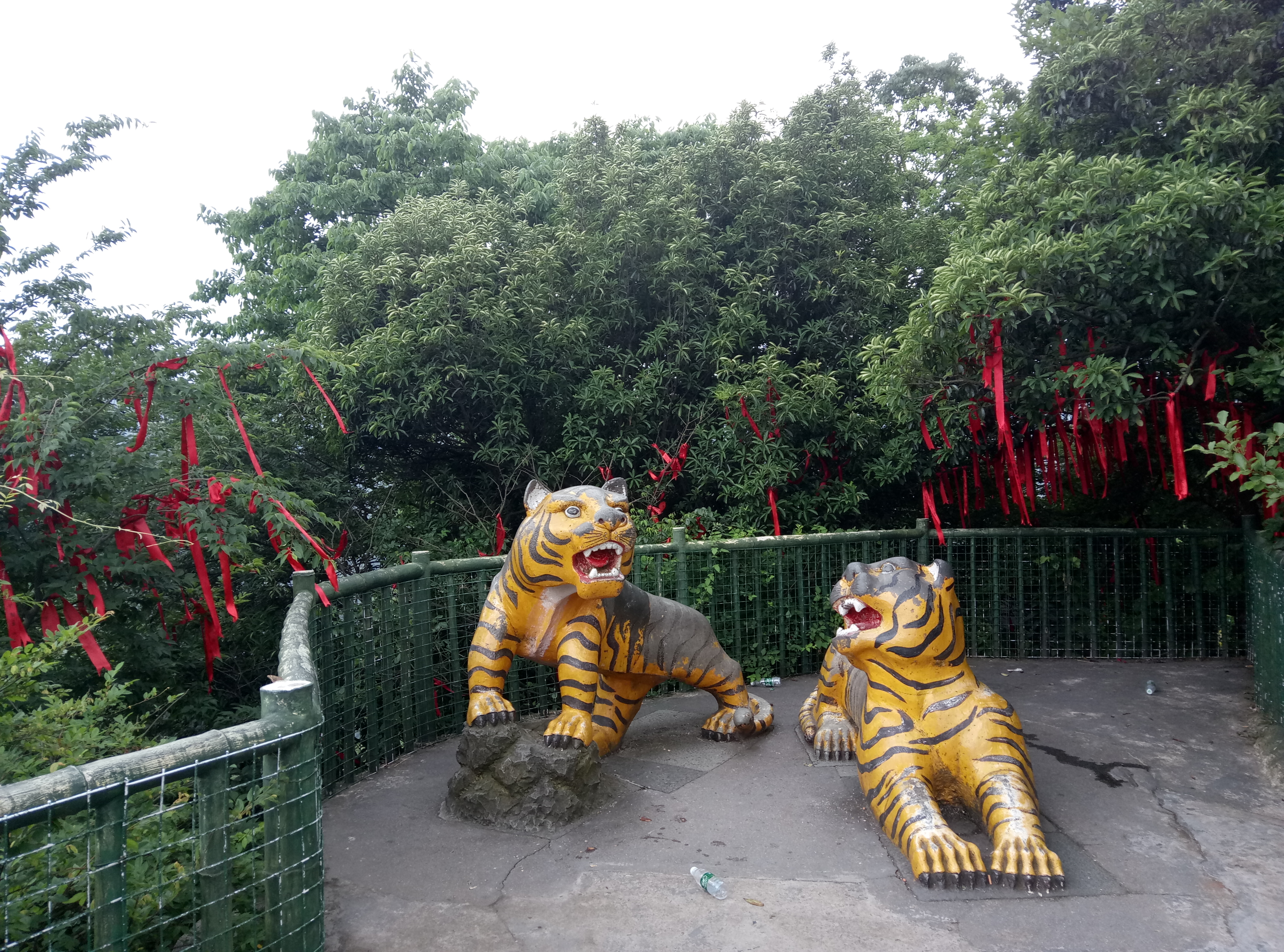 滴水洞的老虎🐯🐯🐯